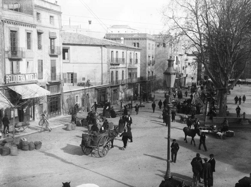 Imatge